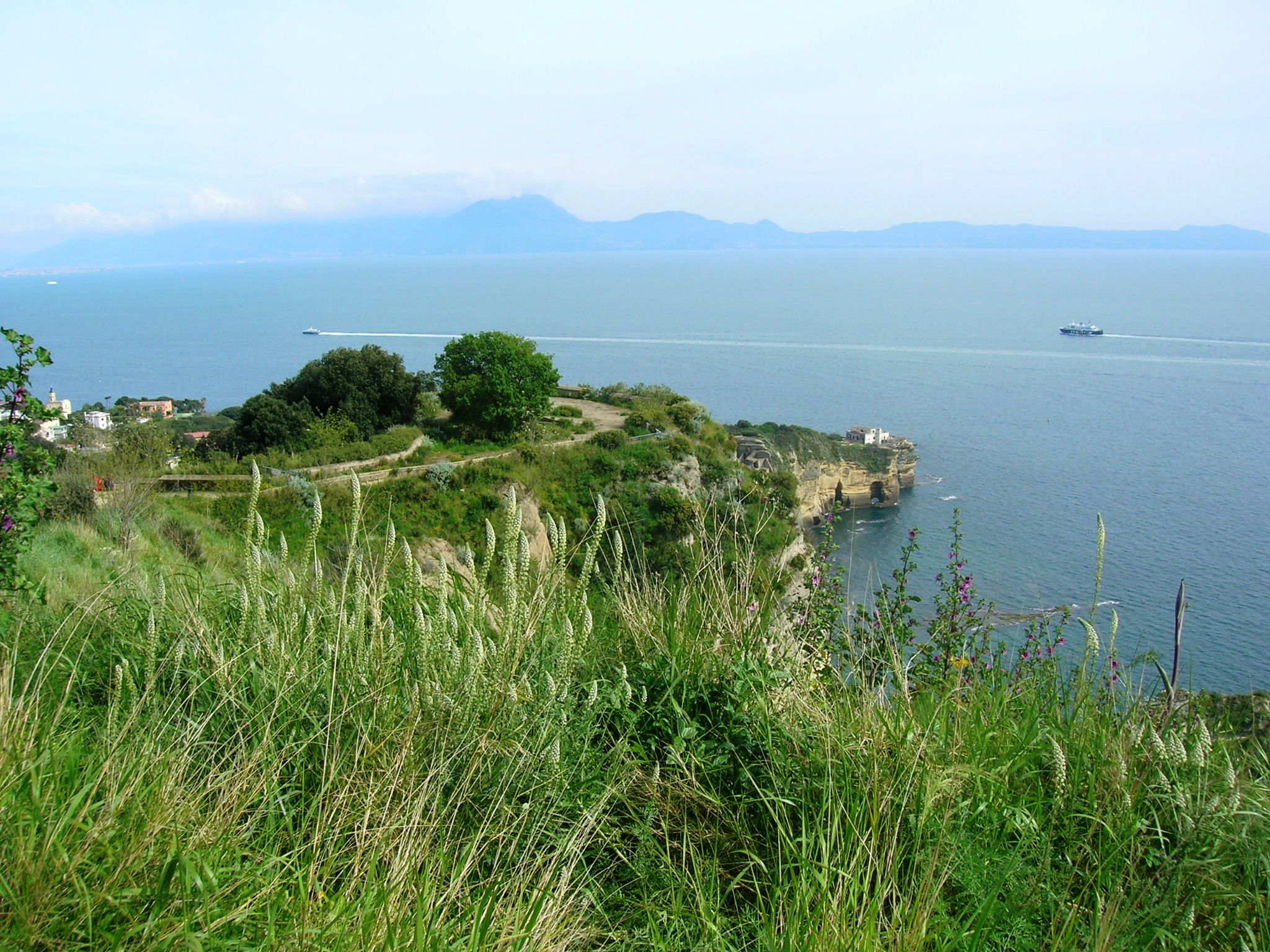 Parco Virgiliano di Napoli